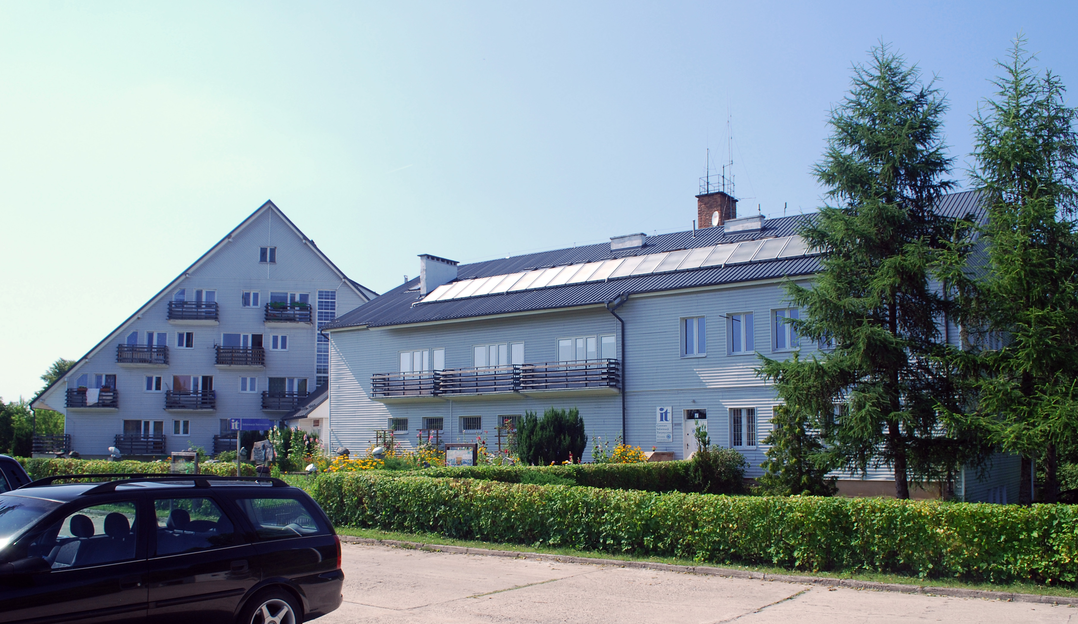 This photo from Podlaskie Voievodeship was taken during Polish Wikiexpedition 2009 set up by Wikimedia Polska Association. The making of this document was supported by Wikimedia Polska. Siedziba Wigierskiego Parku Narodowego w Krzywym, województwo podlaskie.